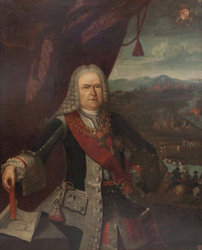 El Conde de Gages, general en Italia durante la Guerra de Sucesión de Austria, sirvió a la Casa de Borbón y fue condecorado por Carlos con la Orden de San Jenaro. Al fondo la batalla de Campo Santo. Su carrera finalizó como virrey de Navarra